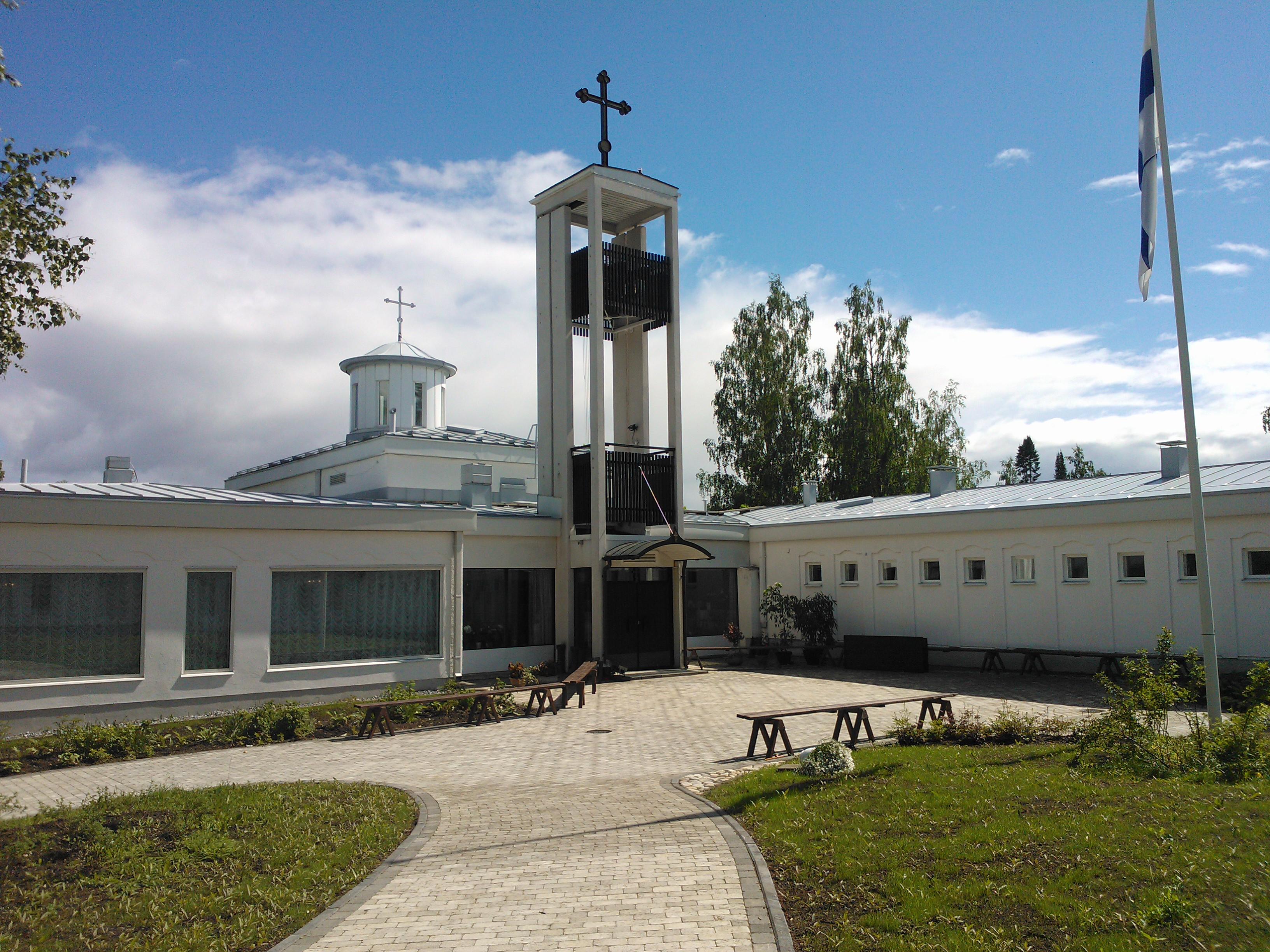 Линтульский монастырь, Финляндия